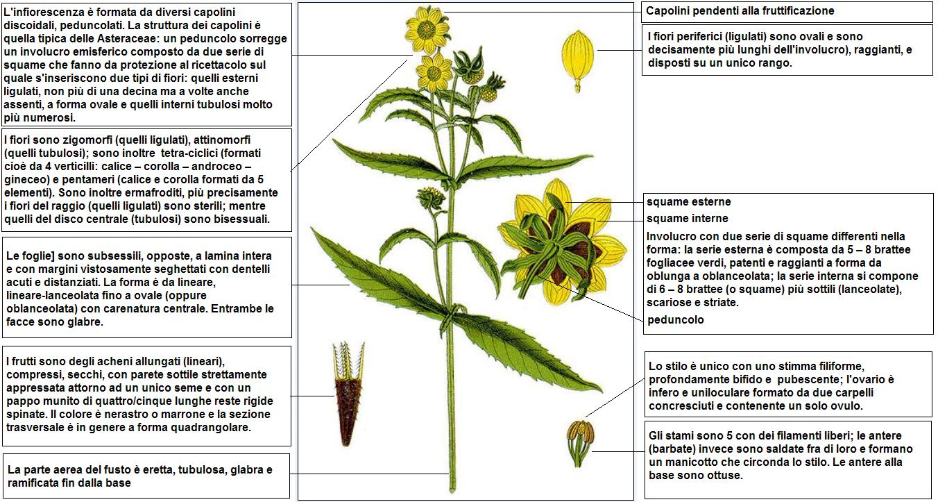 Bidens cernua Sturm DESC